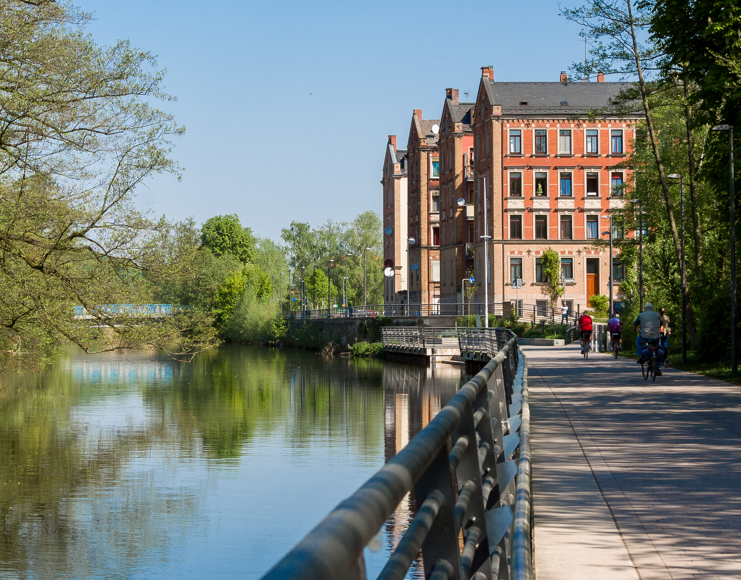 Uferpromenade an der Rednitz mit den "Kißkaltschen Häusern", vorne Denglerstraße 6, FürthThis is a photograph of an architectural monument.